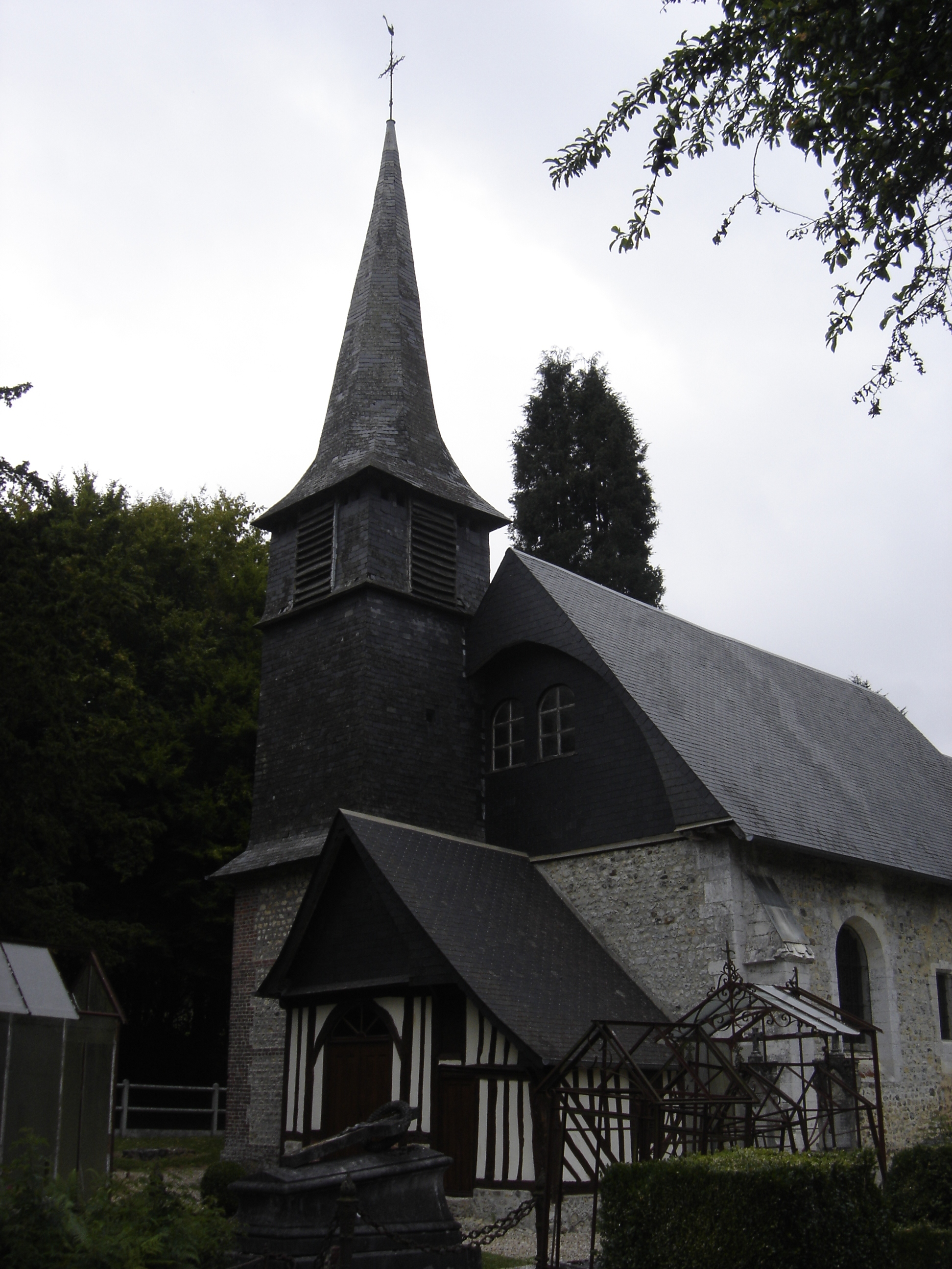 église paroissiale de la Poterie Mathieu